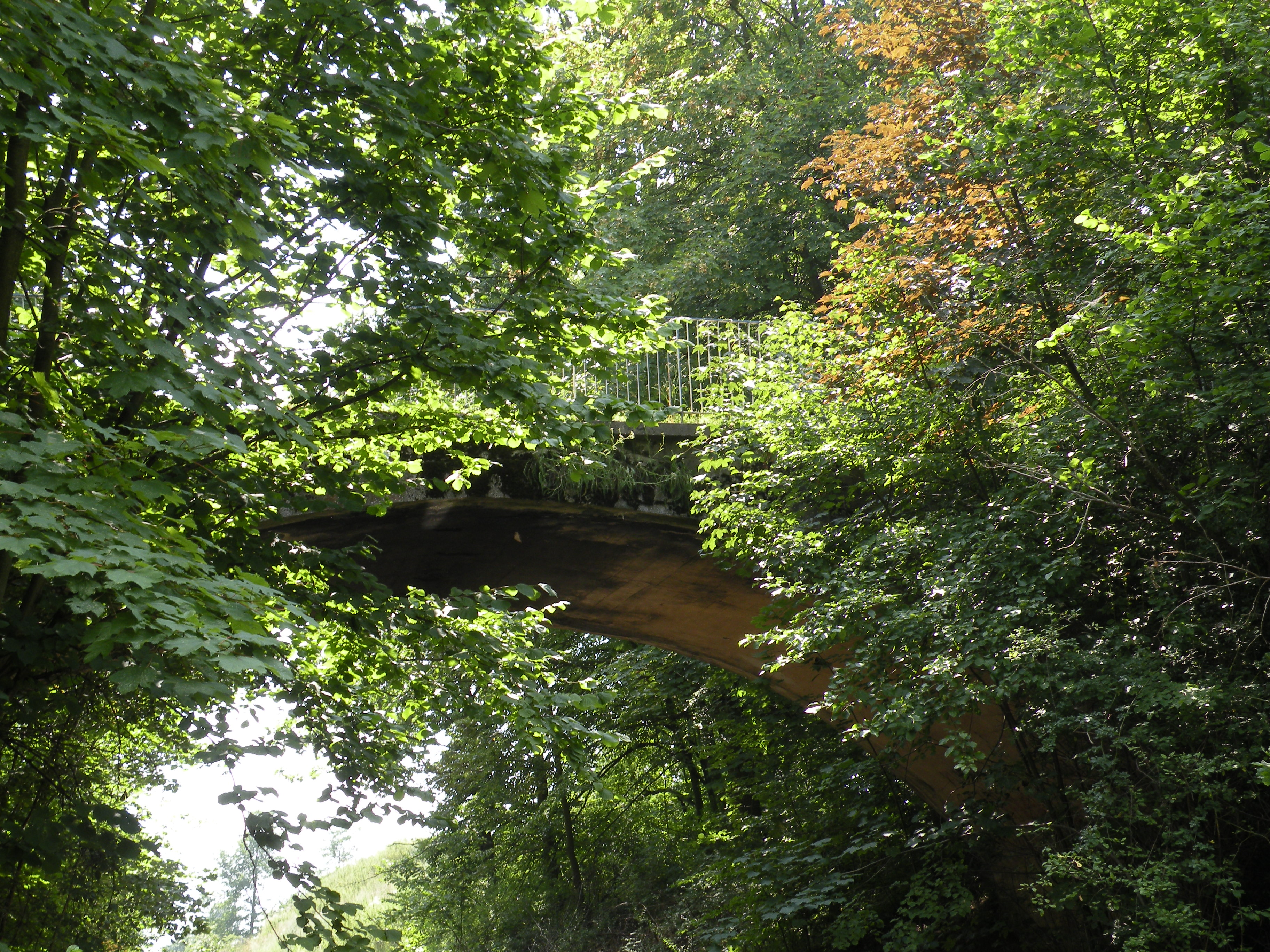 Prakwice, most drogowy nad rozebraną linią kolejową. Linia została rozebrana w 2009 lub 2008 roku.